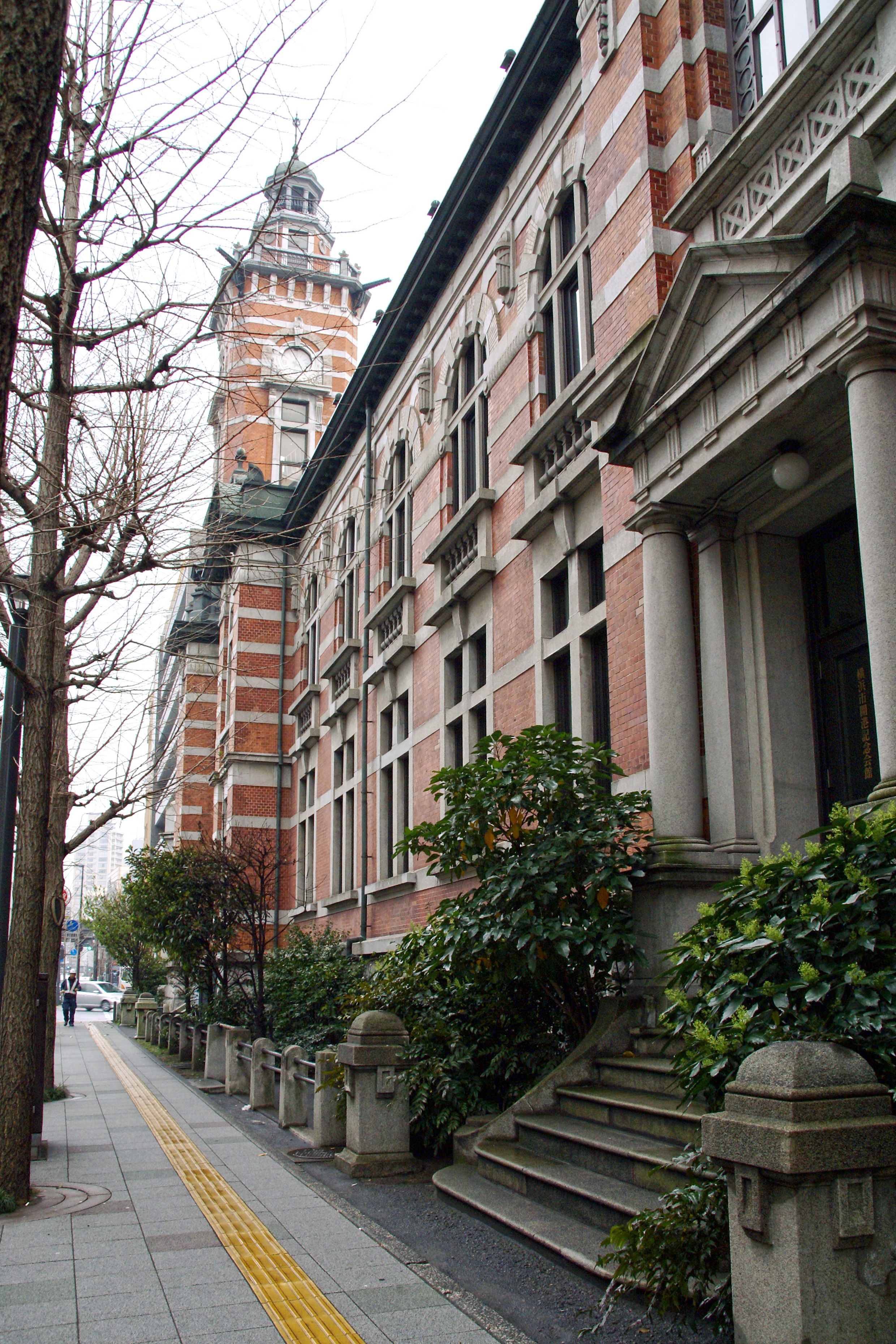 Yokohama Port Opening Memorial Hall in Yokohama, Japan